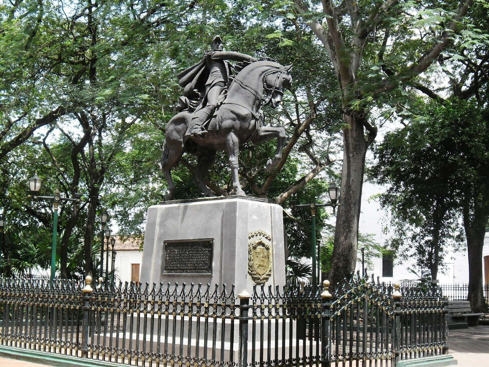 Plaza Bolívar de Calabozo